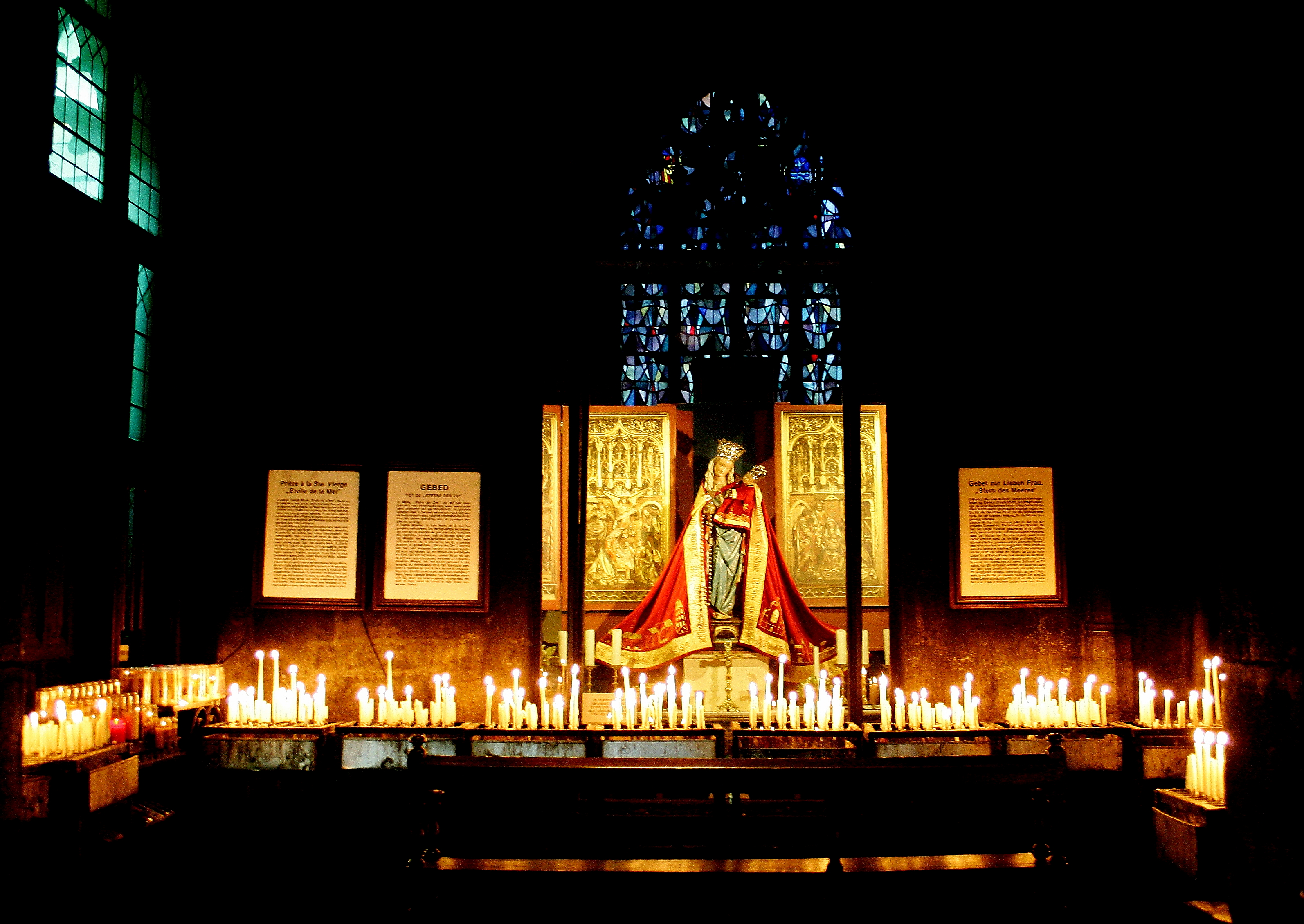 Een portaal naast het westwerk biedt toegang tot de kerk. In zijn oorsprong dateert dit portaal uit de 13e eeuw, maar in de 15e eeuw werd het in gotische stijl verbouwd, toen het tevens ging dienen als toegang tot de achterliggende kapel van O.L. Vrouwe Sterre der Zee. De kapel van Onze Lieve Vrouw wordt ook wel de 13e-eeuwse Merode-kapel genoemd. In de kapel staat het genadebeeld van Onze Lieve Vrouw. Het beeld is miraculeus: er zijn claims van genezingen opgetekend nadat men de voorspraak van de Maagd Maria had ingeroepen. Het genadebeeld wordt altijd meegedragen in de grote stadsprocessie op of rond de feestdag van Sint Servatius.